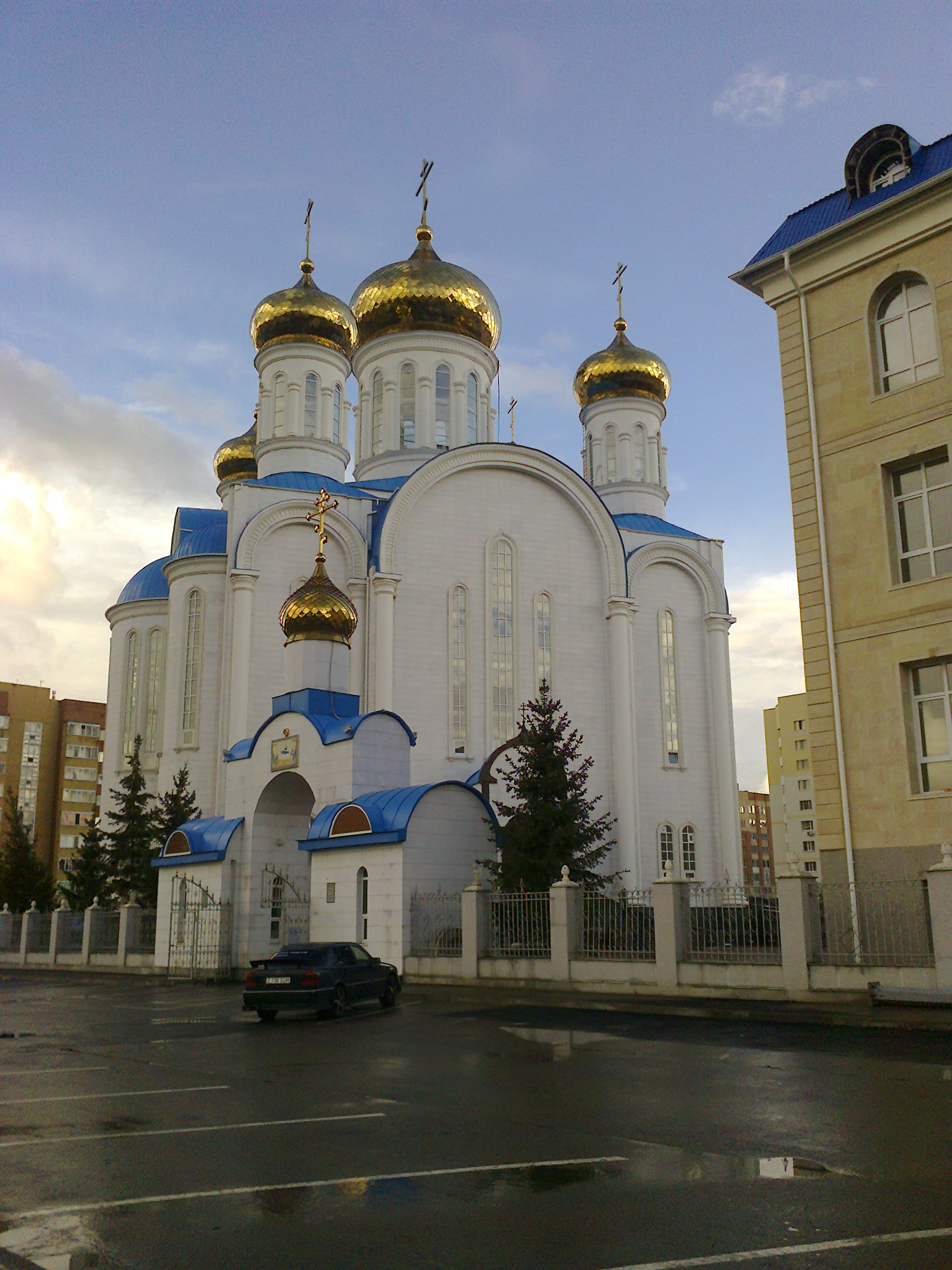 Кафедральный собор в честь Успения Пресвятой Богородицы